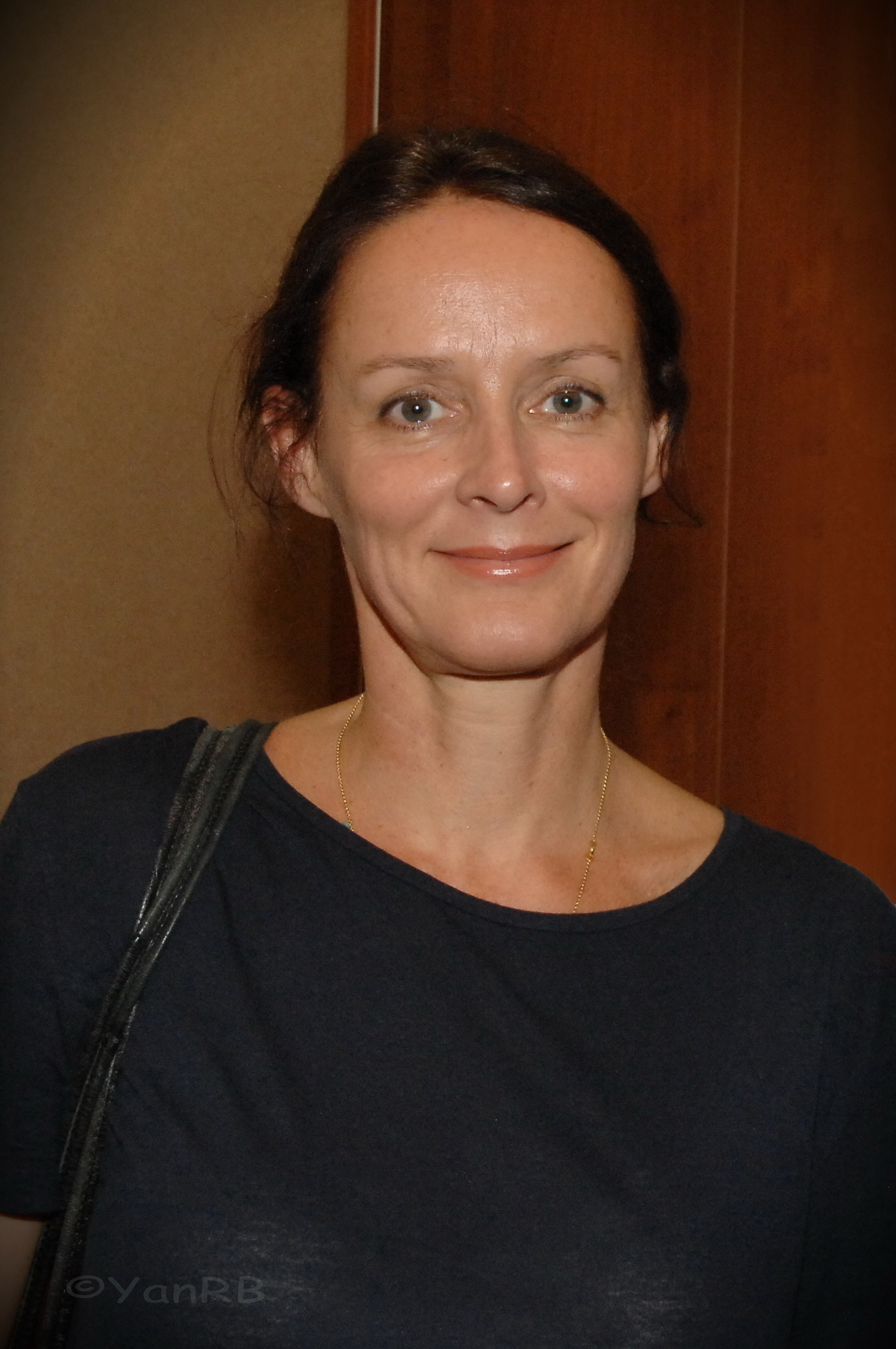 photo de Claude Perron prise pendant le fifigro 2015